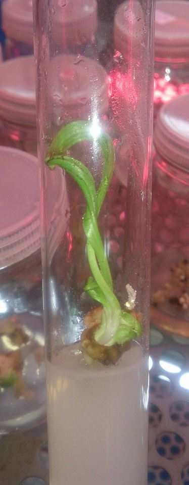 การเพาะเลี้ยงเนื้อเยื่ออินทผลัม